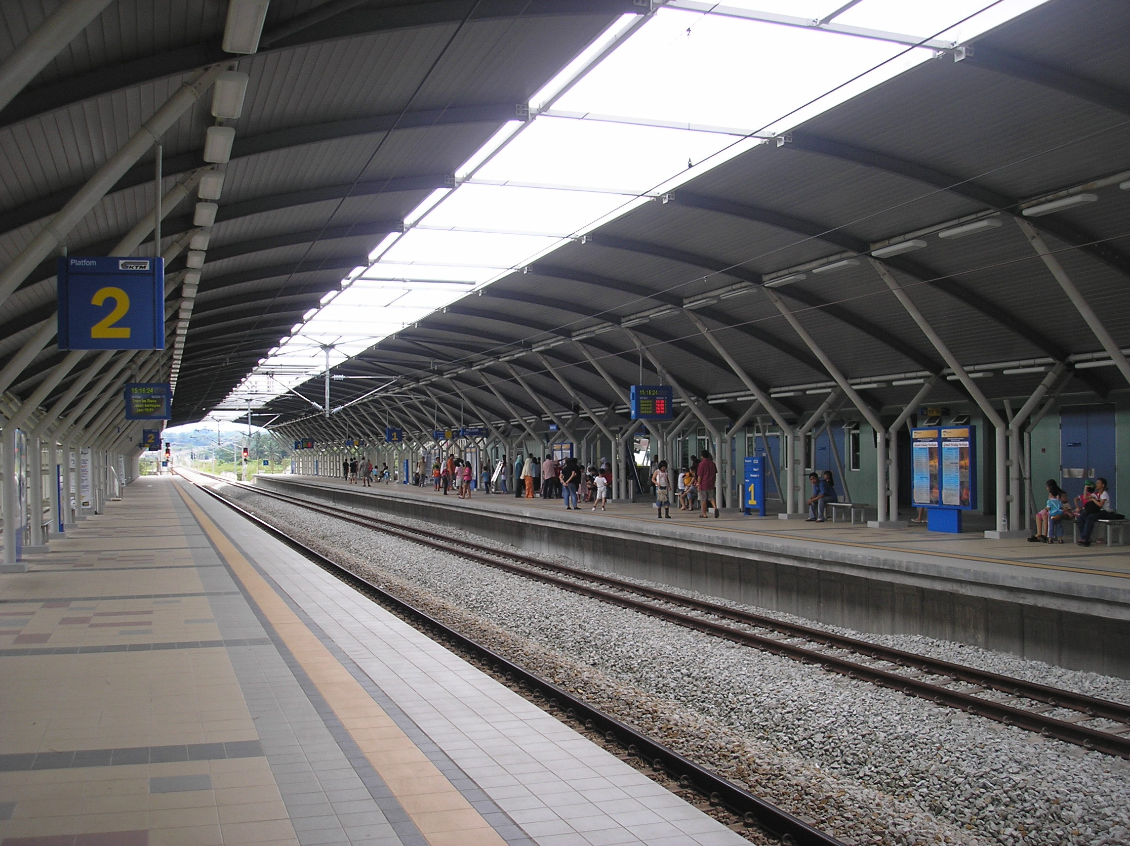 The Batang Kali station (Rasa-Rawang), near Batang Kali, Selangor, Malaysia.